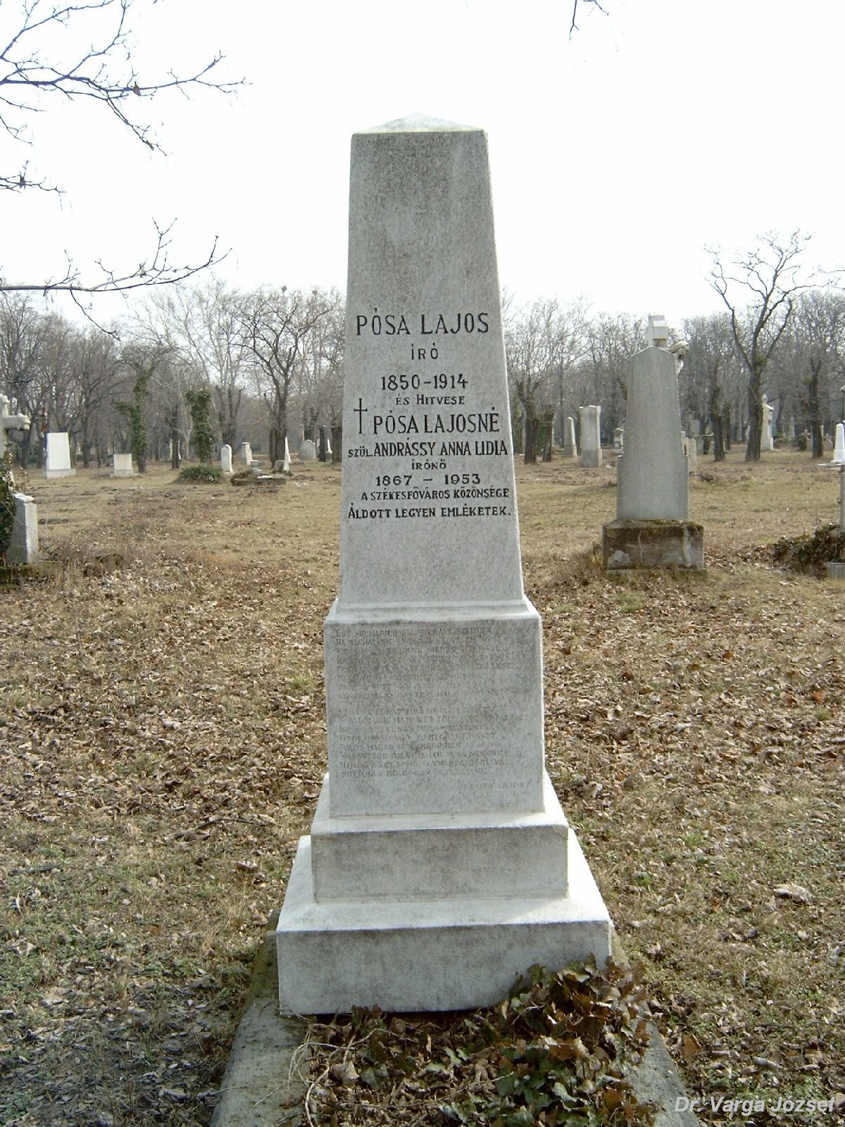 Pósa Lajos (Radnót, 1850. ápr. 9. – Bp., 1914. júl. 9.) költő, ifjúsági író sírja Budapesten. Vele felesége: Andrássy Anna Lídia (1867-1953) írónő. Kerepesi temető: 9-1-100.